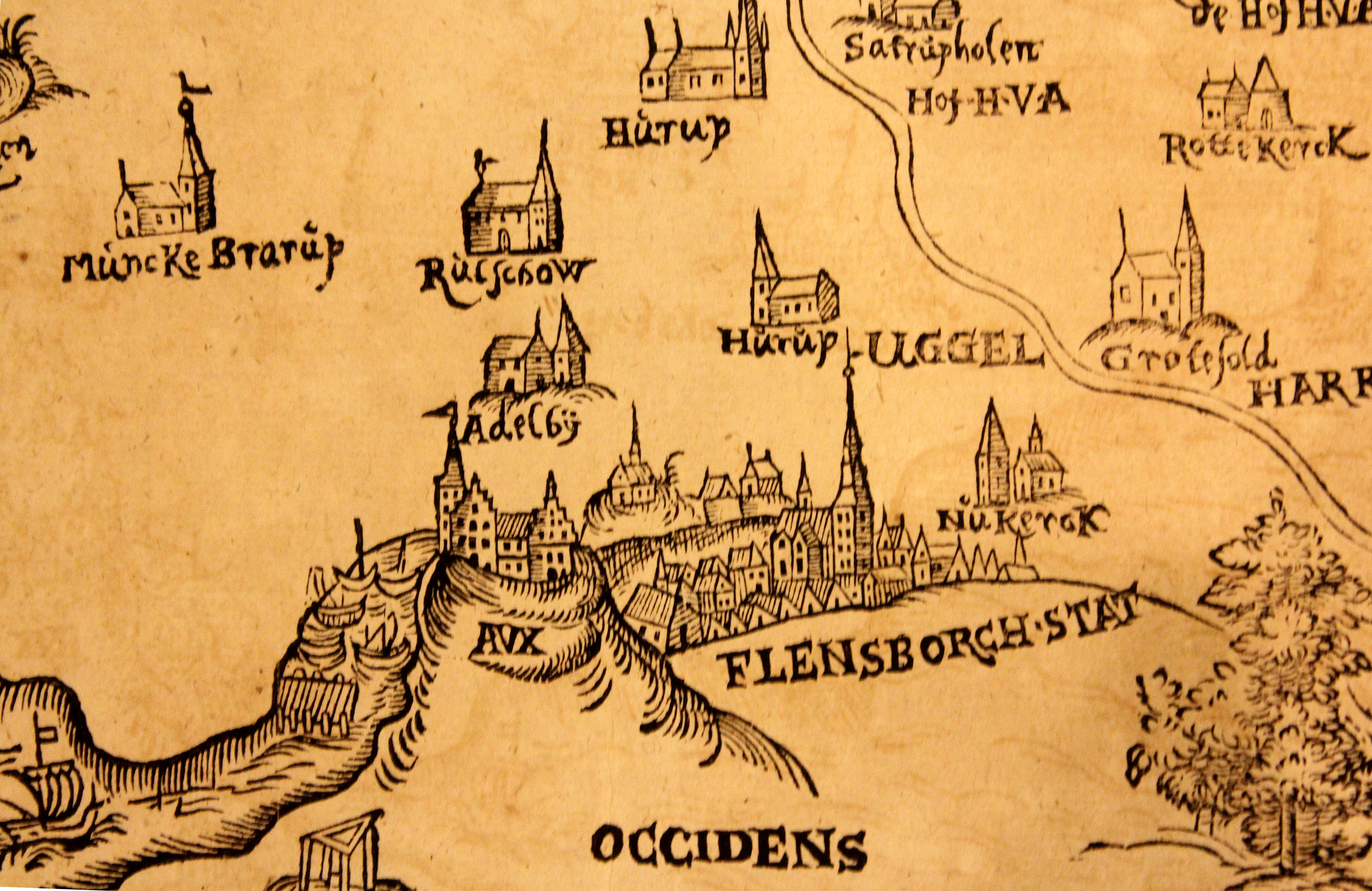 Foto von der Karte von Angeln von 1596, Teil der Karte mit Flensburg, Adelby etc, Bild 02